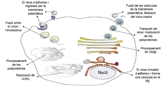 Cicle de transmissió del Dengue